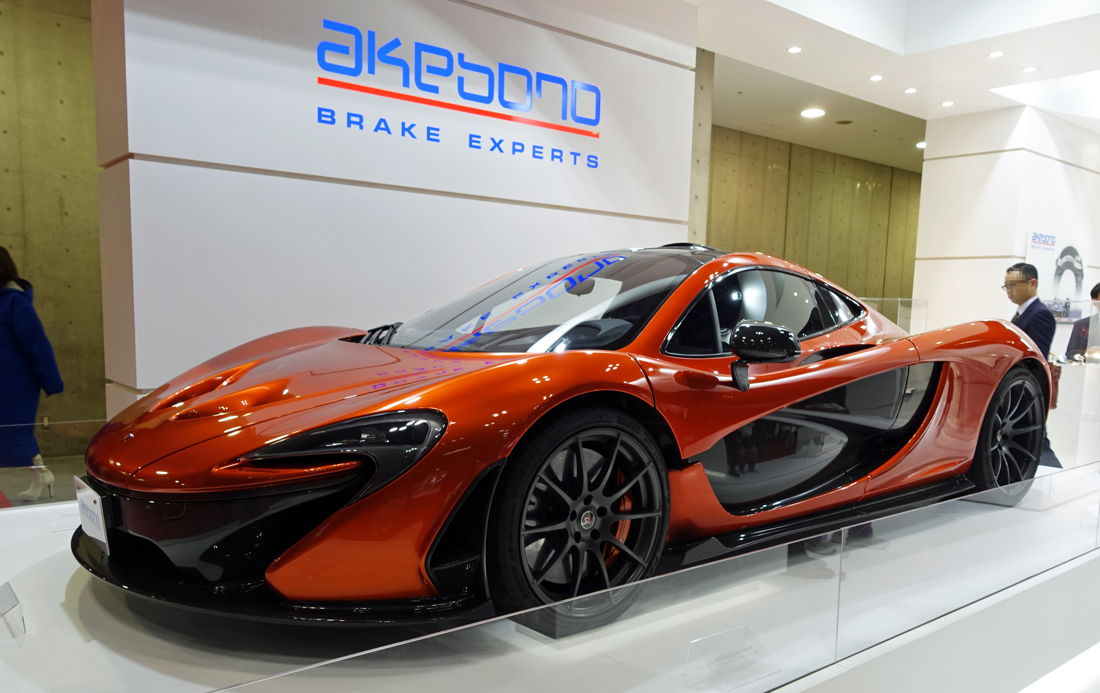 東京モーターショー2015で展示されていたマクラーレン・P1（部品メーカーの曙ブレーキ工業が展示）